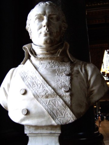 Buste du général Jean Jacques Causse (1751-1796) par Jacques-Edme Dumont, dans la galerie des batailles du château de Versailles